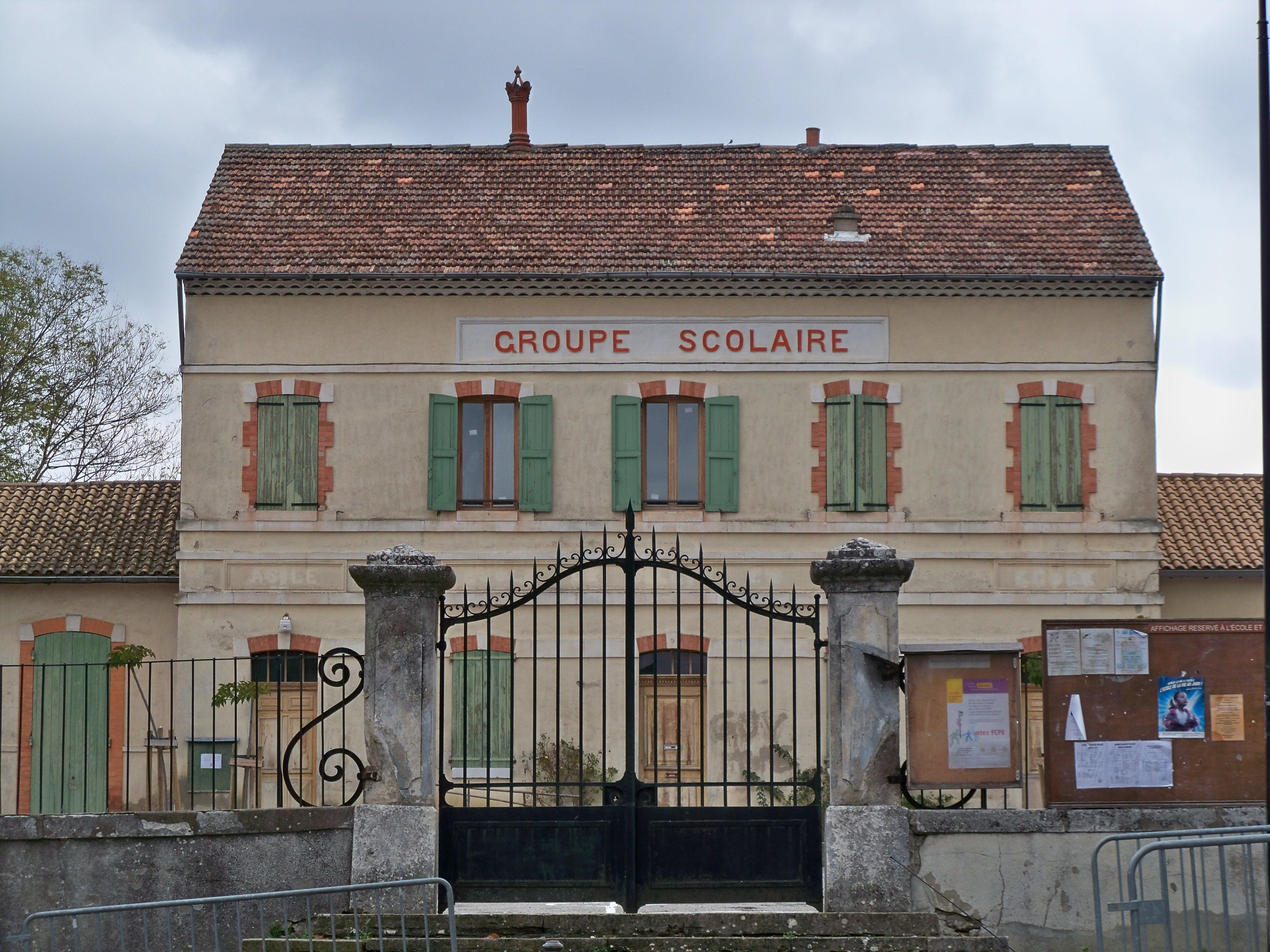 école de Céreste, Alpes de Haute Provence, France